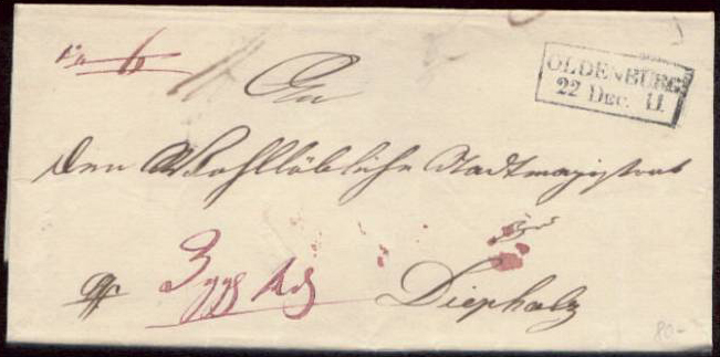 Почтовый конверт отправленный из Ольденбурга 22 декабря 1841 года